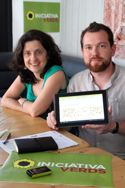 Fina Santiago i David Abril presenten l'aplicació per Android del partit ecosocialista.